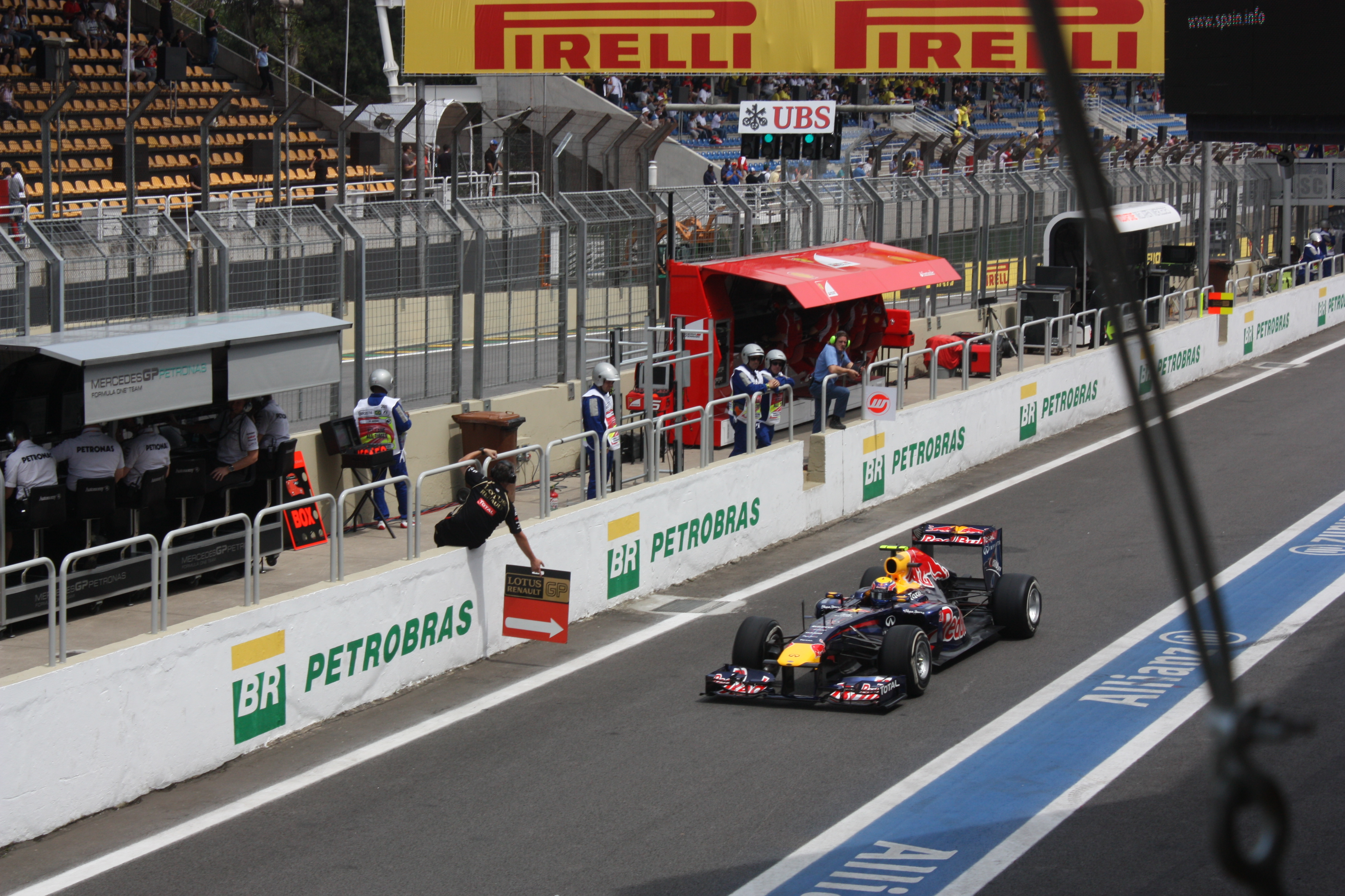 Carro saindo do bor, treino de sábado